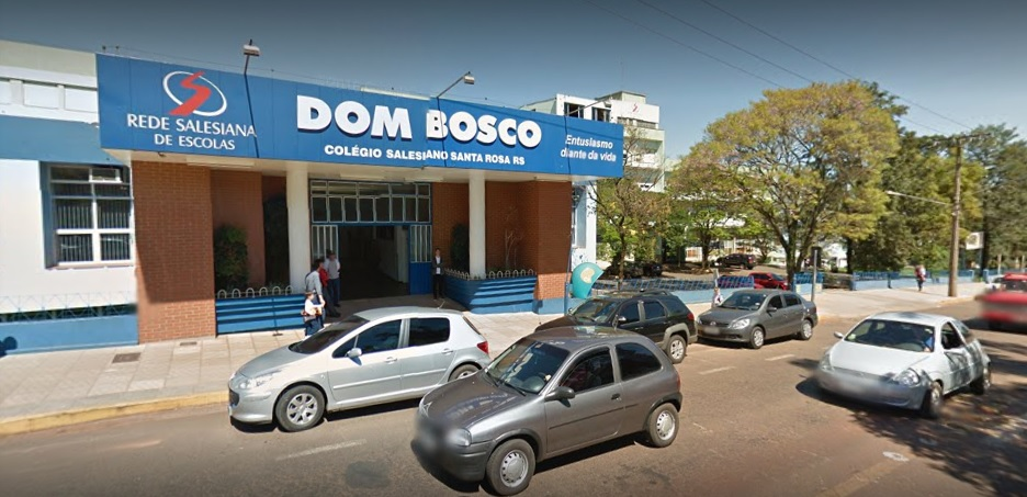 fachada